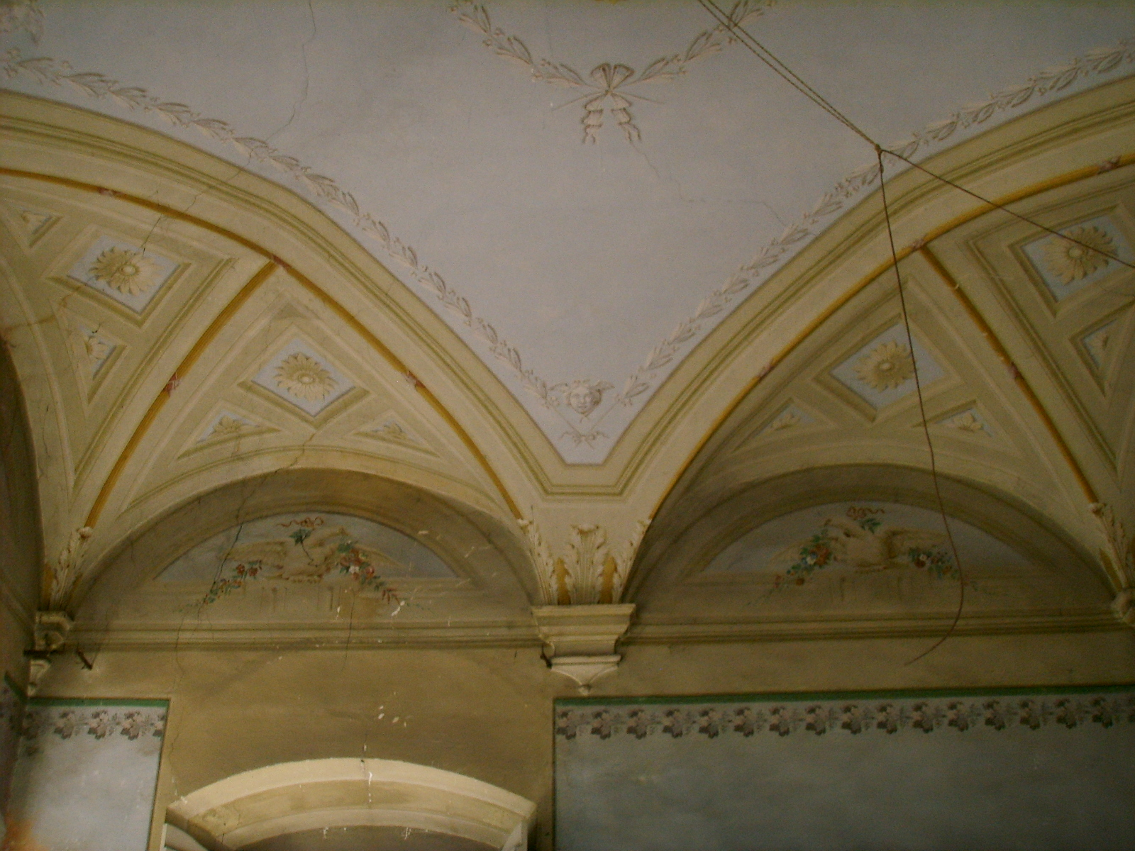 Villa Corsini interni